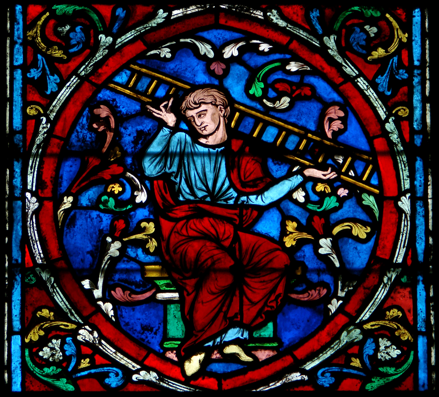 Vitrail de la cathédrale Notre-Dame de Paris: l'arbre de Jessé. Détail:Jacob (l'arbre de Jessé présente parfois, outre les ancêtres du Christ, des figures de l'Ancien Testament; il s'agit ici d'une figure latérale qui n'est pas au-dessus de Jessé). Vitrail signé par Didron et daté de 1864 (?), date de la fin de la campagne de restauration confiée à Viollet-le-Duc.